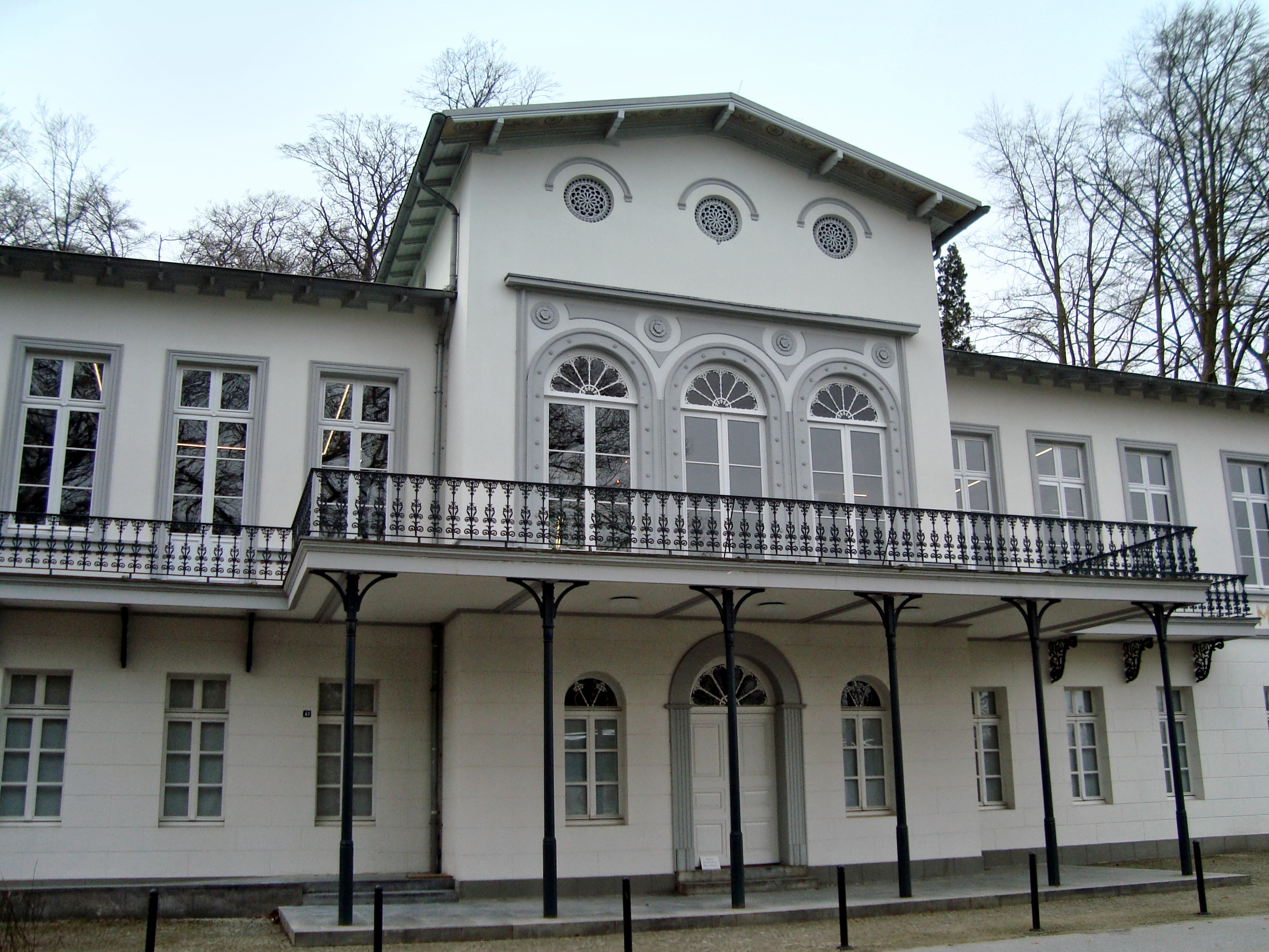 Museum Kurhaus Kleve, ehemaliges Friedrich-Wilhelms-Bad, 1846